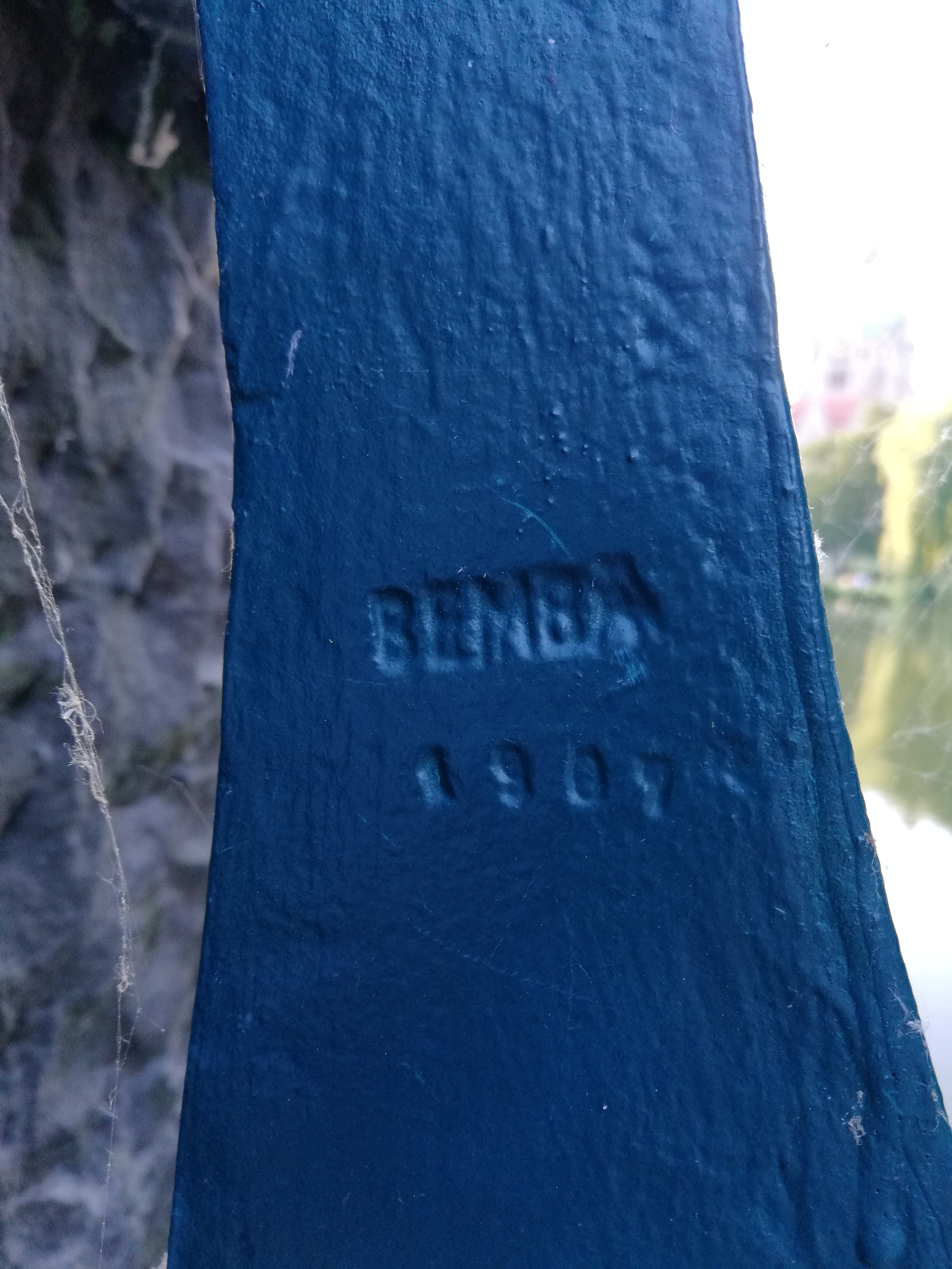 Ein gut für Eltern mit ihren Kindern geeignetes Sachensuchen- oder Sachenfinden-Spiel: 1907 in das Schmiedeeisen eingeschlagener Stempel der Schlosserei von Rudolf Bemba, der seinerzeit im Parterre des Gebäudes unter der Adresse Clevertor 2g die heute denkmalgeschützten Ziergitter für die Maschpark-Brücke geschaffen hat ...